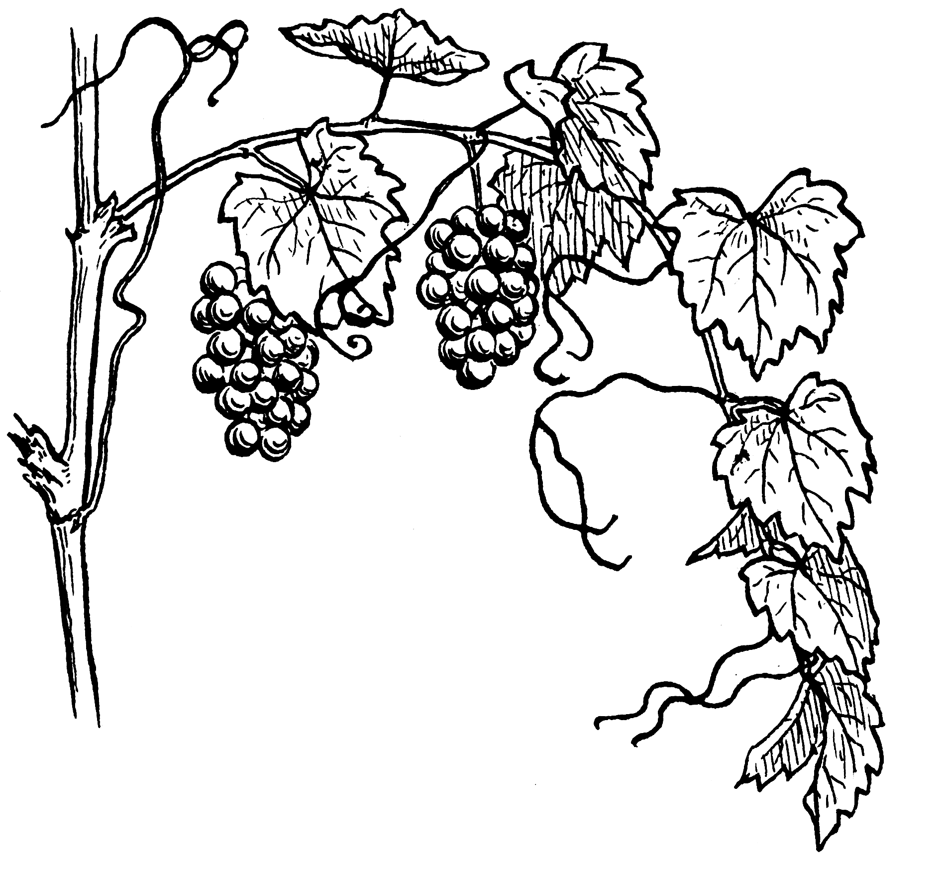 Grapevine